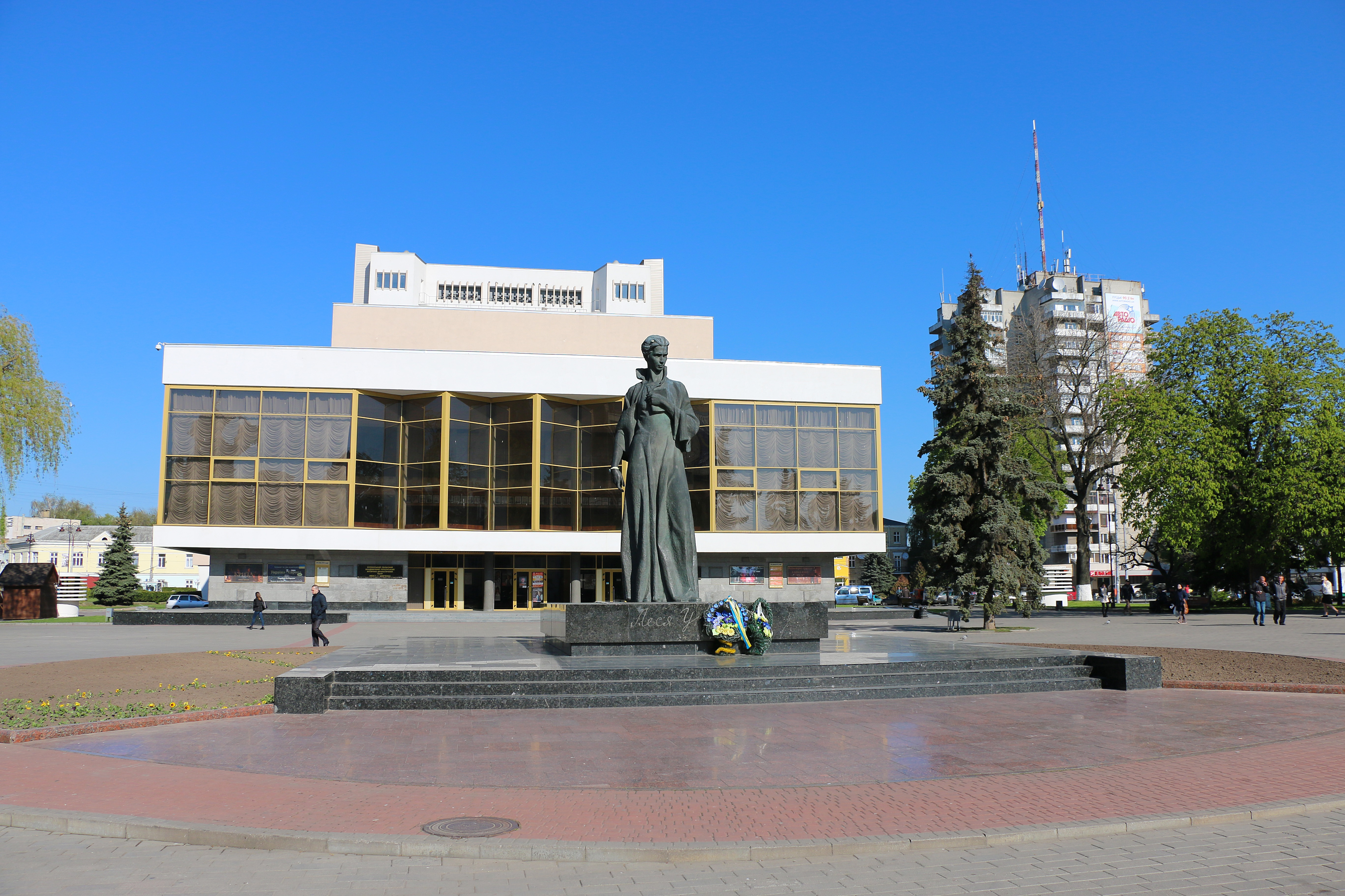 Пам'ятник поетесі і громадській діячці Лесі Українці, Луцьк, Театральний майдан